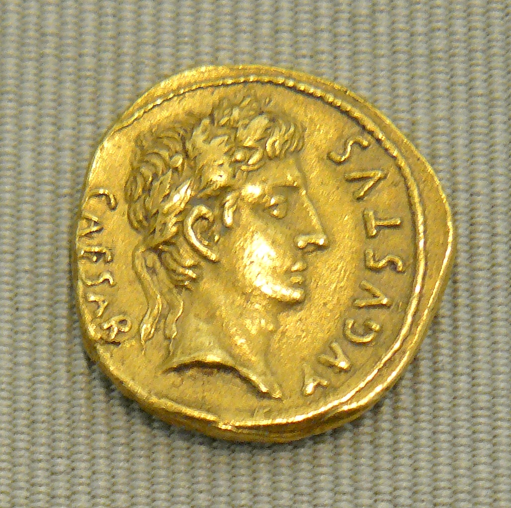 Aureus d'Auguste émis à Rome, 19 av.JC. - Or 8,04 g - BNCMER I 112 - Cabinet des médailles, Paris